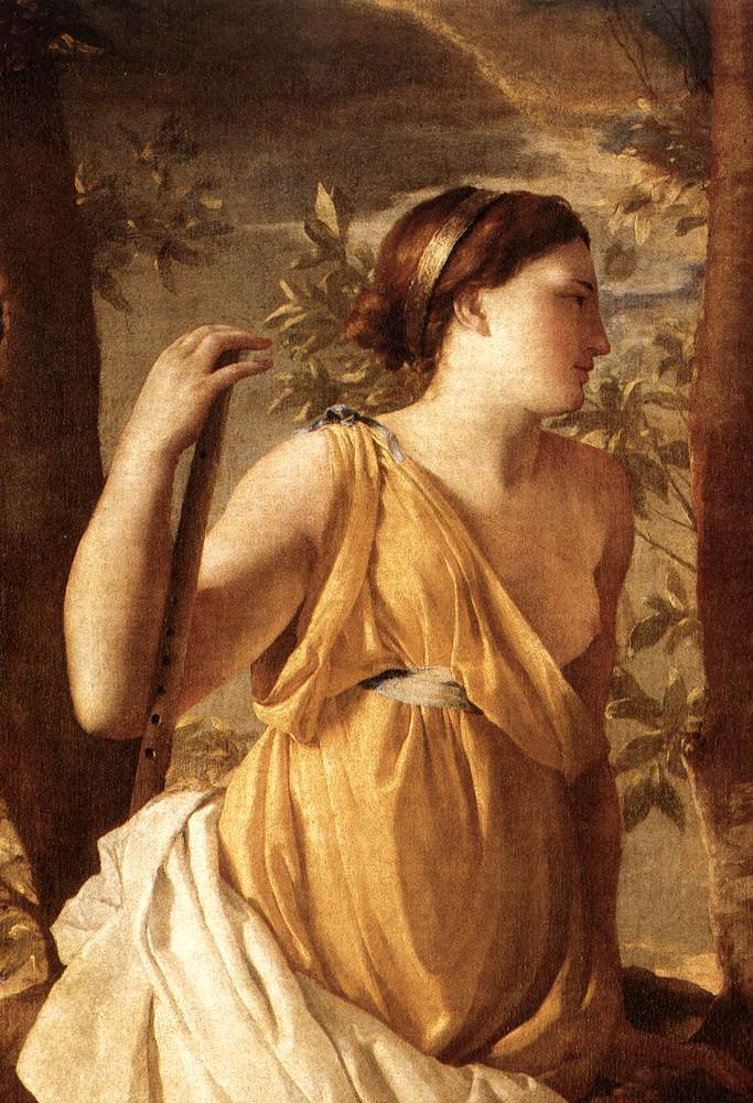 Le jeune homme de droite écrivant sous l'inspiration d'Apollon est peut-être Virgile : la femme debout, à gauche, serait Calliope, Muse de l'éloquence et de la poésie héroïque. Le tableau pourrait avoir été peint en l'honneur d'un poète contemporain ou récemment disparu.